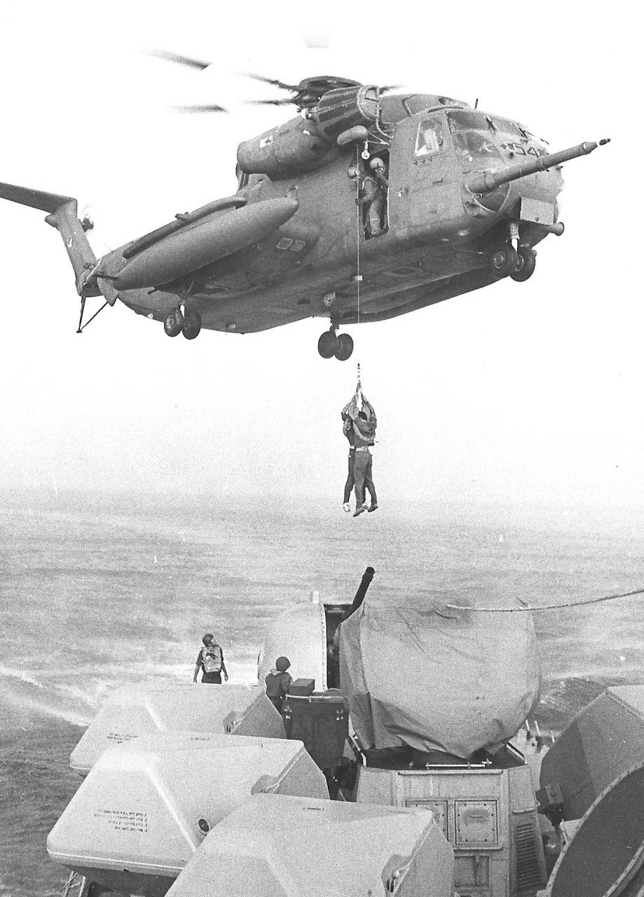 הרמת לוחמים למסוק מעל ירכתי ספינת סער 4